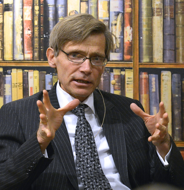 Per Svensson presenterar sin nya bok "Wasakärven och järnröret" på Akademibokhandeln i Stockholm den 6 december 2014.